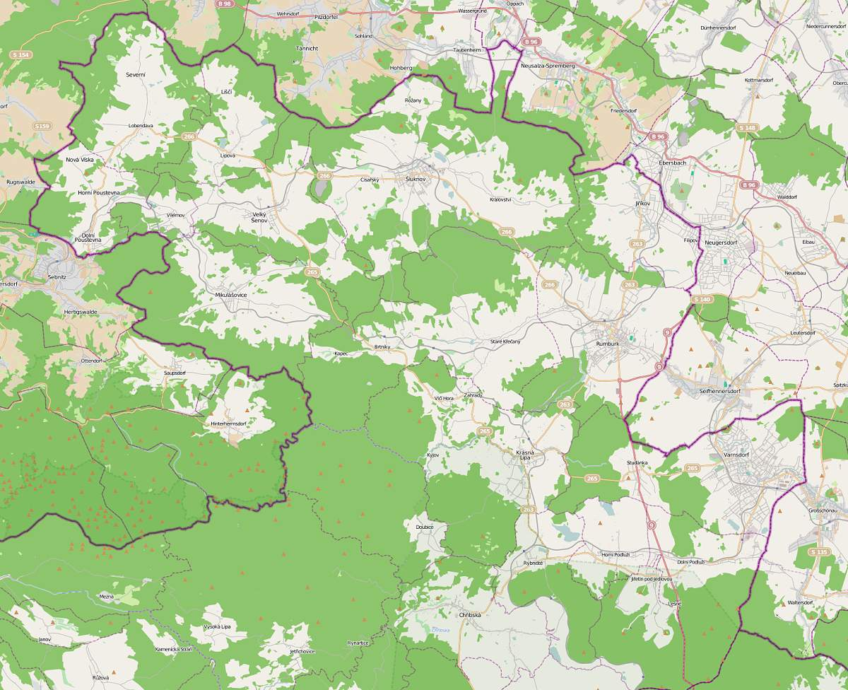 Mapa Šluknovského výběřku